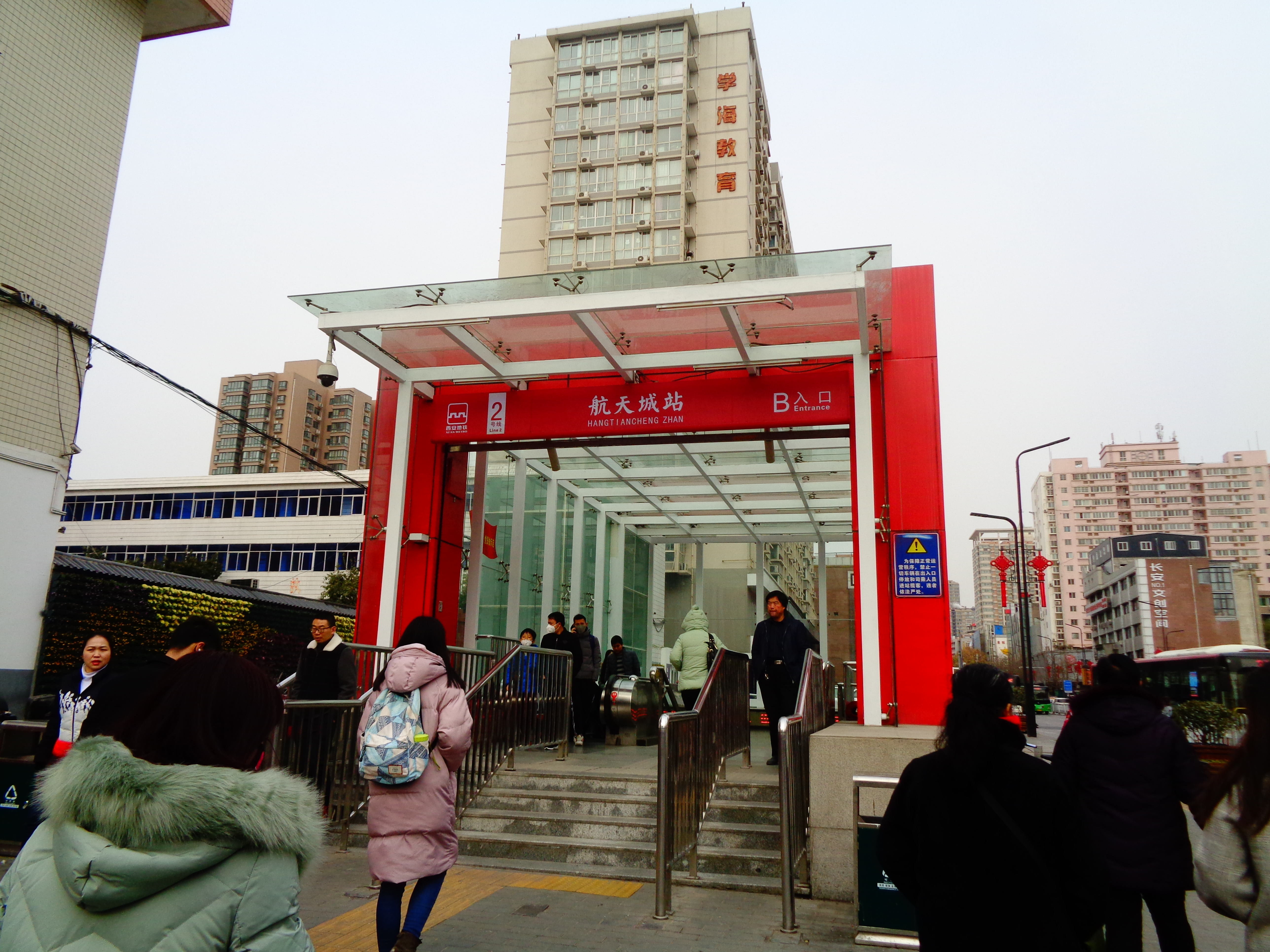 西安地铁航天城站